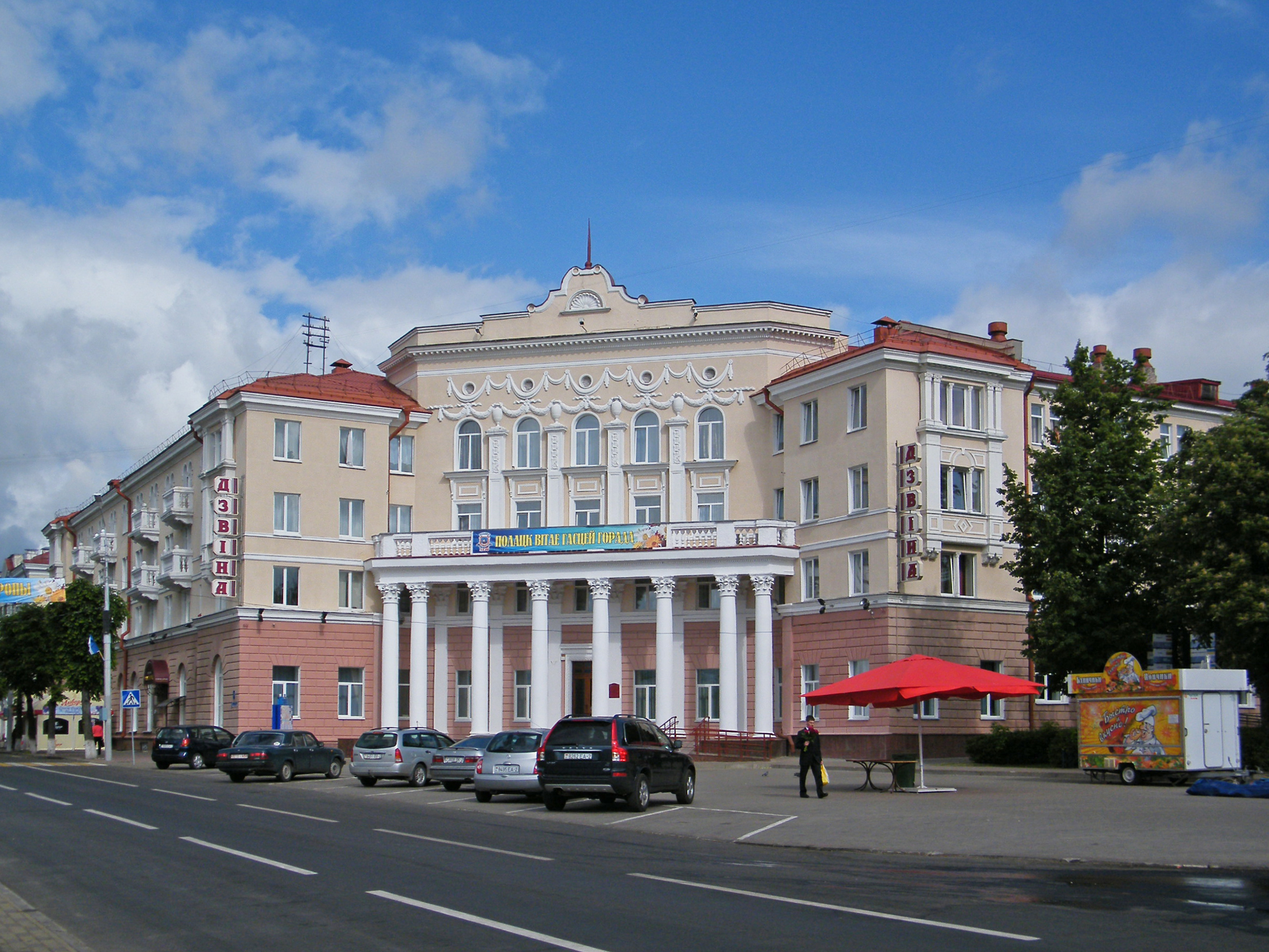 Połosk - "Hotel Dźwina"